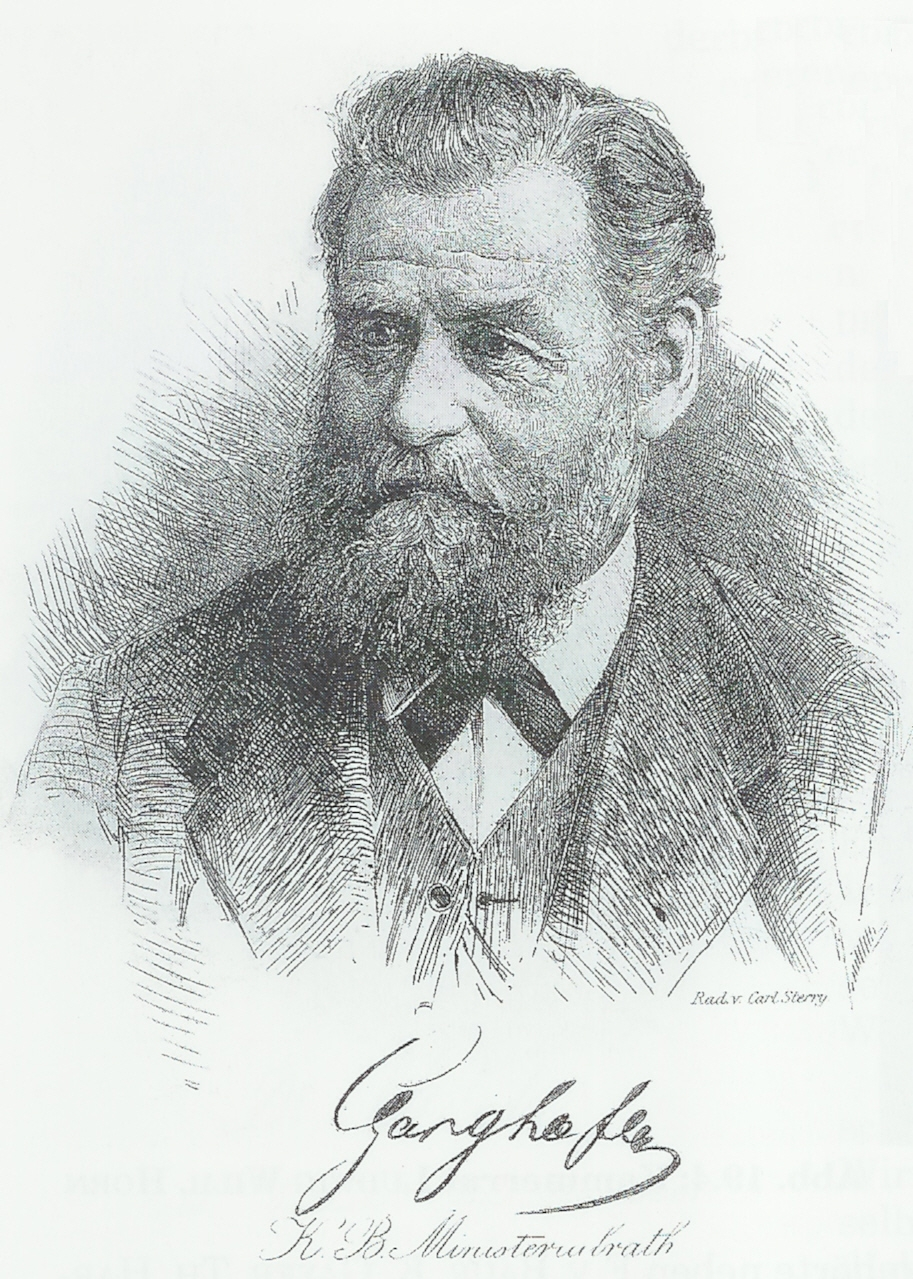 August Ritter von Ganghofer (1827-1900), Bavarian forester. Etching by Carl Sterry. / August Ritter von Ganghofer (1827-1900), bayerischer Forstmann. Radierung von Carl Sterry.